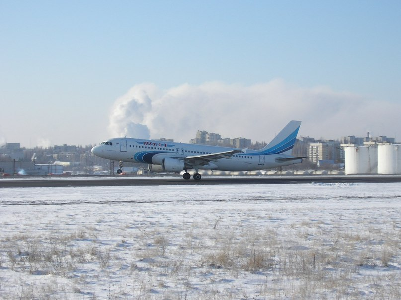 Airbus A-320-200 авиакомпании "Ямал" в Белгороде